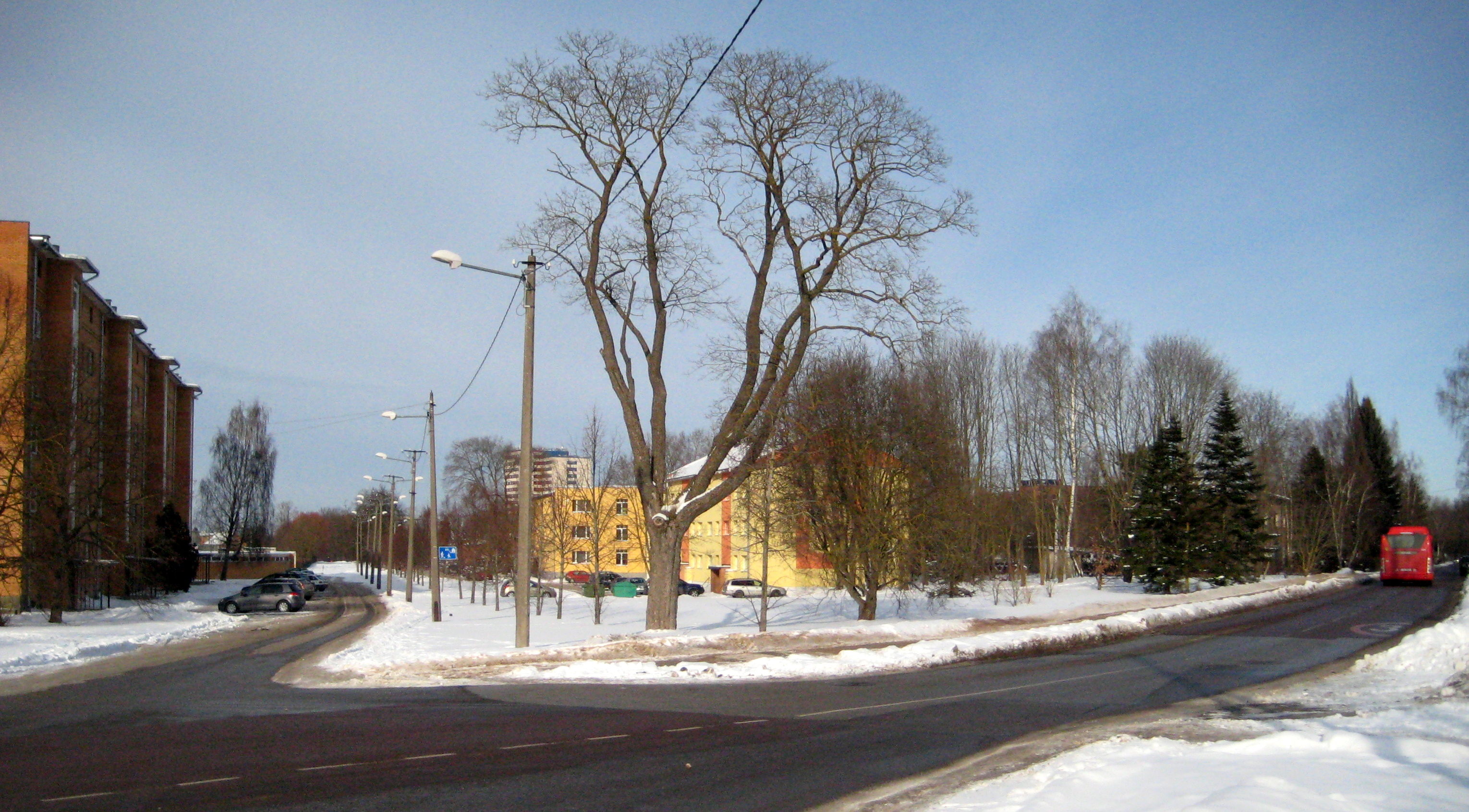 A. H. Tammsaare tänav (vasakul) ja Hiie tänav (paremal), Tartu. Paremal taamal buss nr 20.